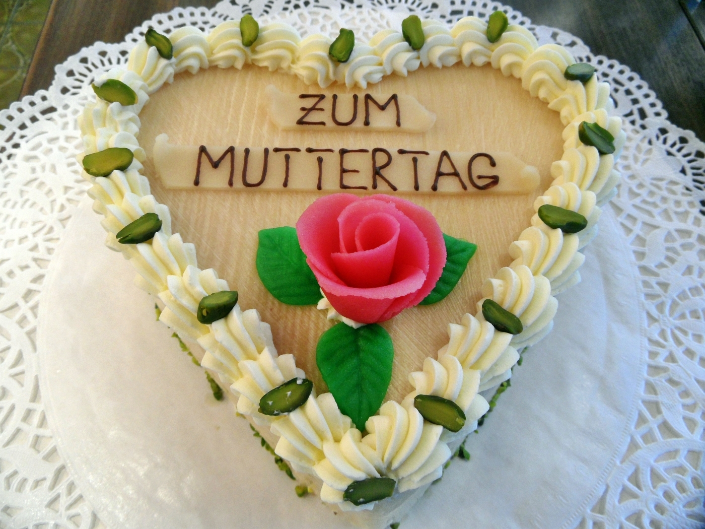 Marzipan Maraschino Torte zum Muttertag. Kurcafe.